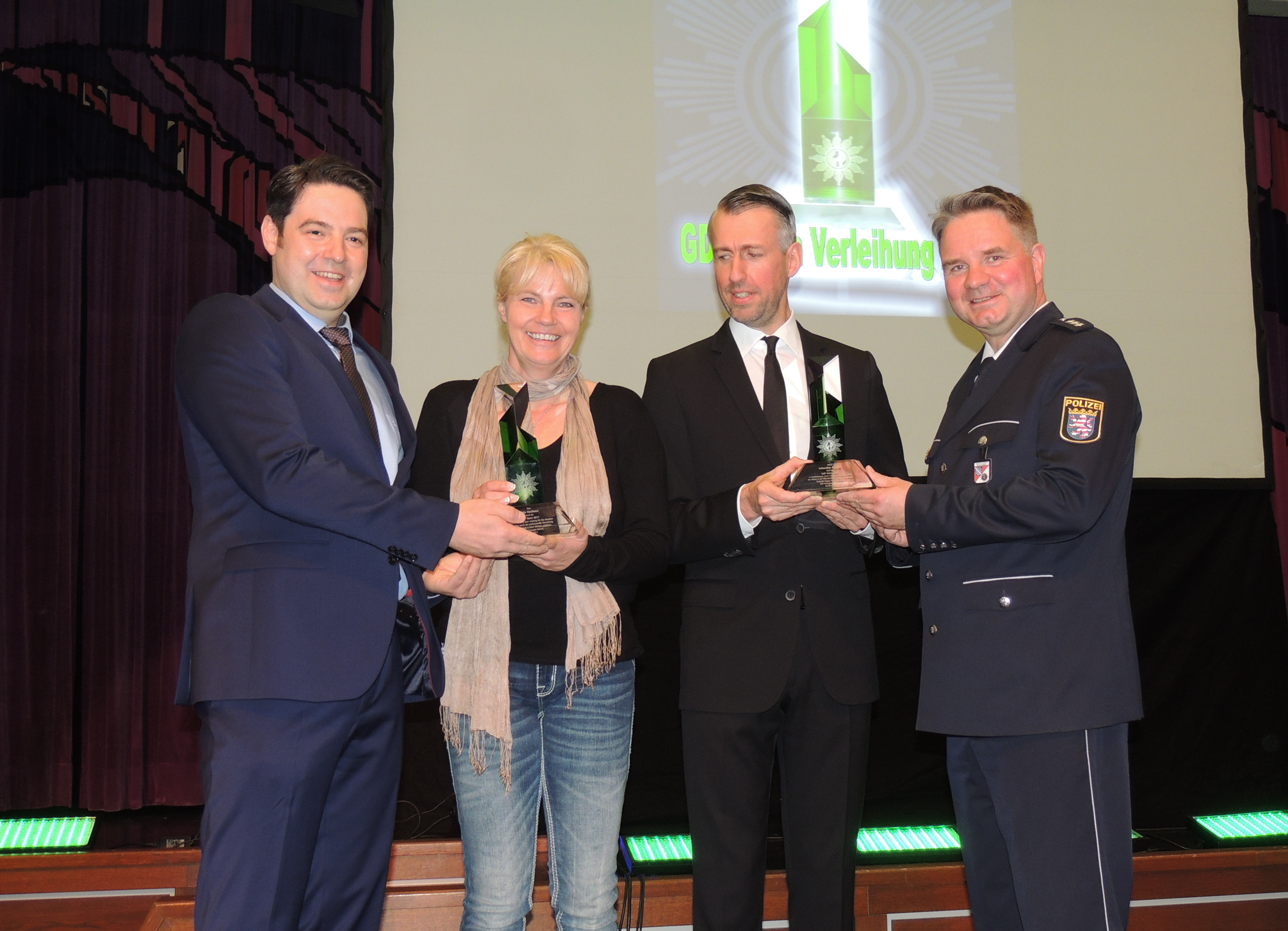 Preisverleihung 2017. Nele Neuhaus und Sebastian Pufpaff waren die Preisträger. Geisler hat die Preisverleihung 2017 dokumentiert.